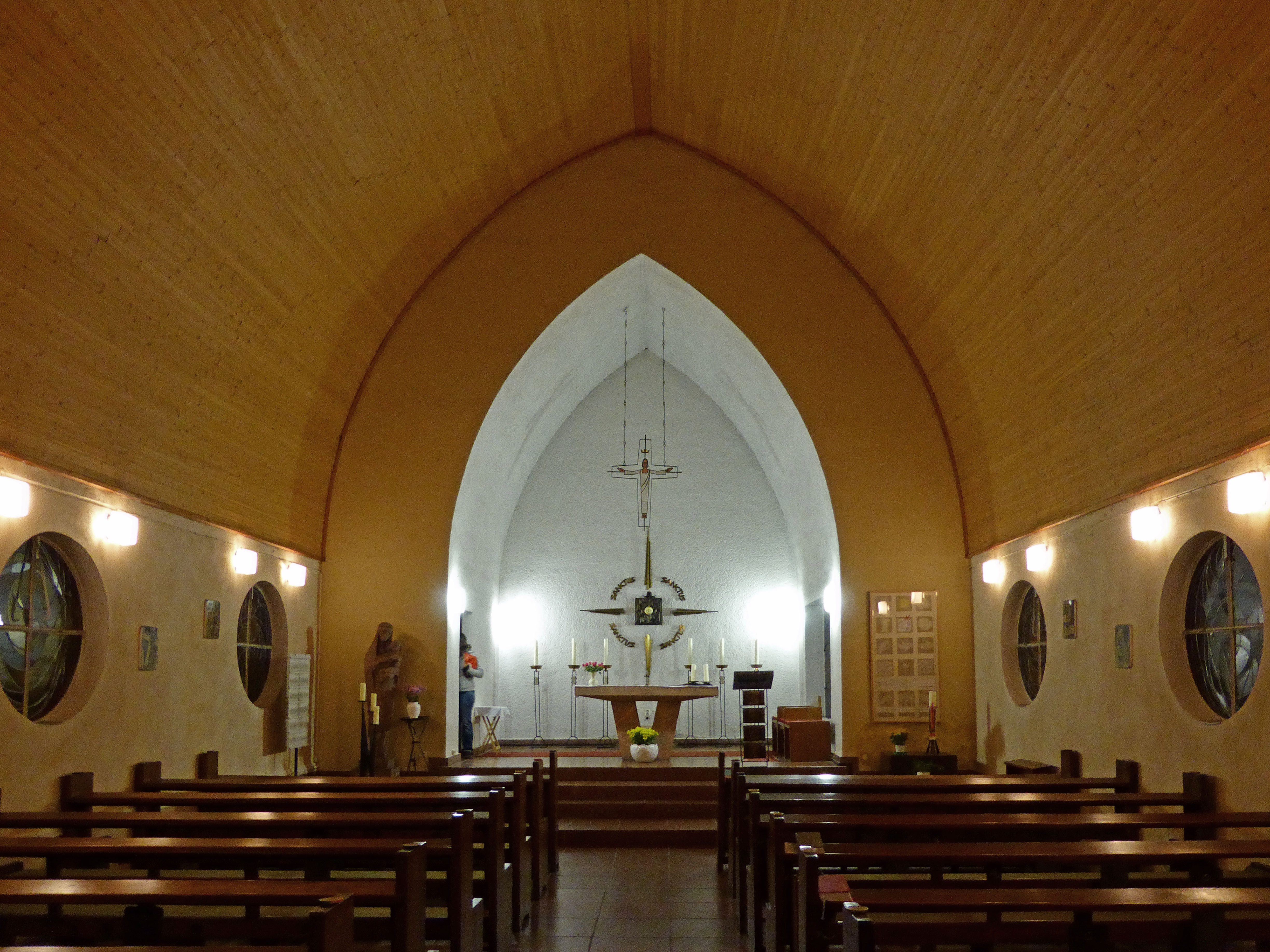 Katholische St.-Elisabeth-Kirche in Tangerhütte, Innenansicht.